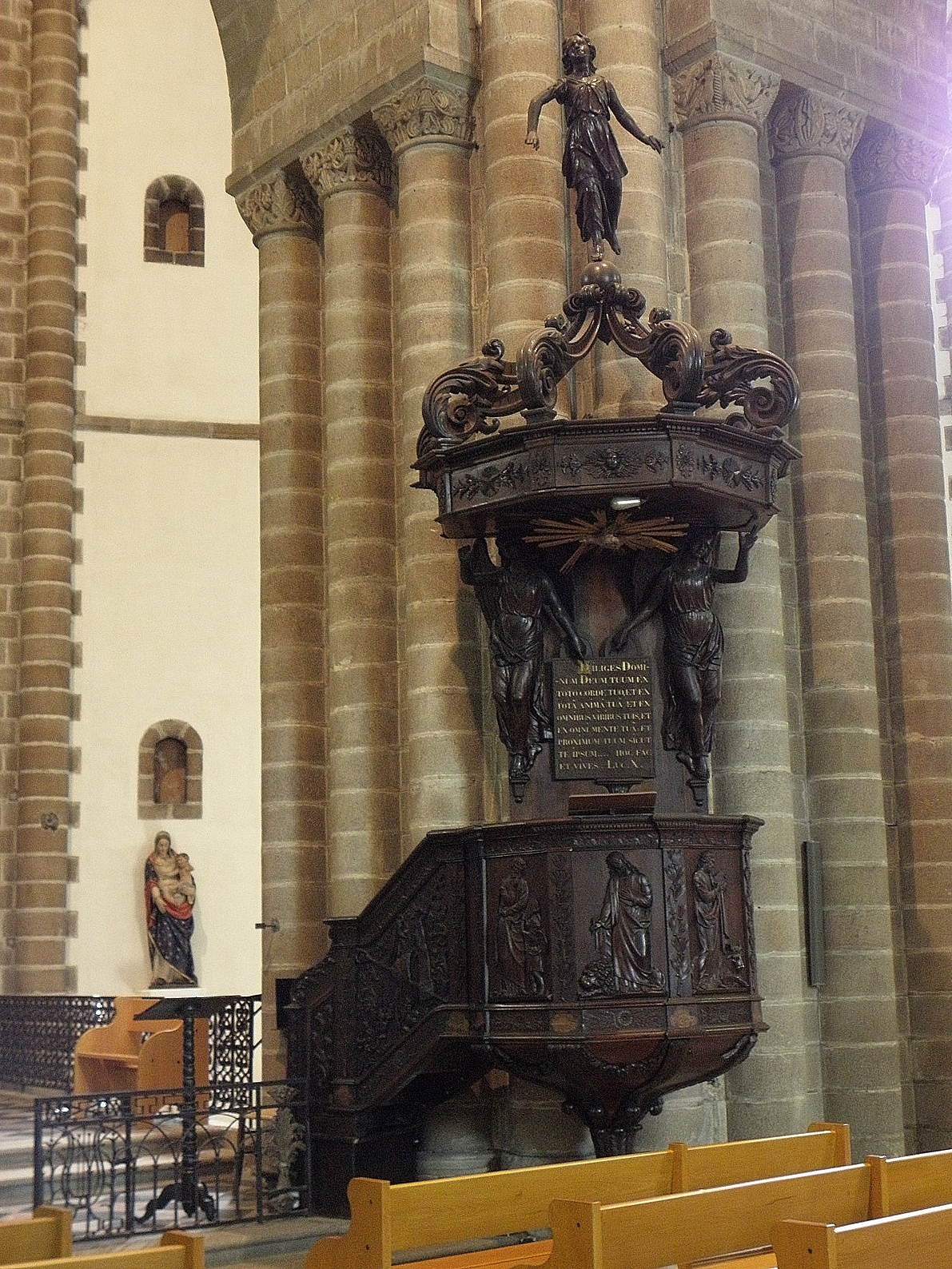 Chaire et pile sud-est de la croisée de l'abbatiale Sainte-Croix de Quimperlé (29).